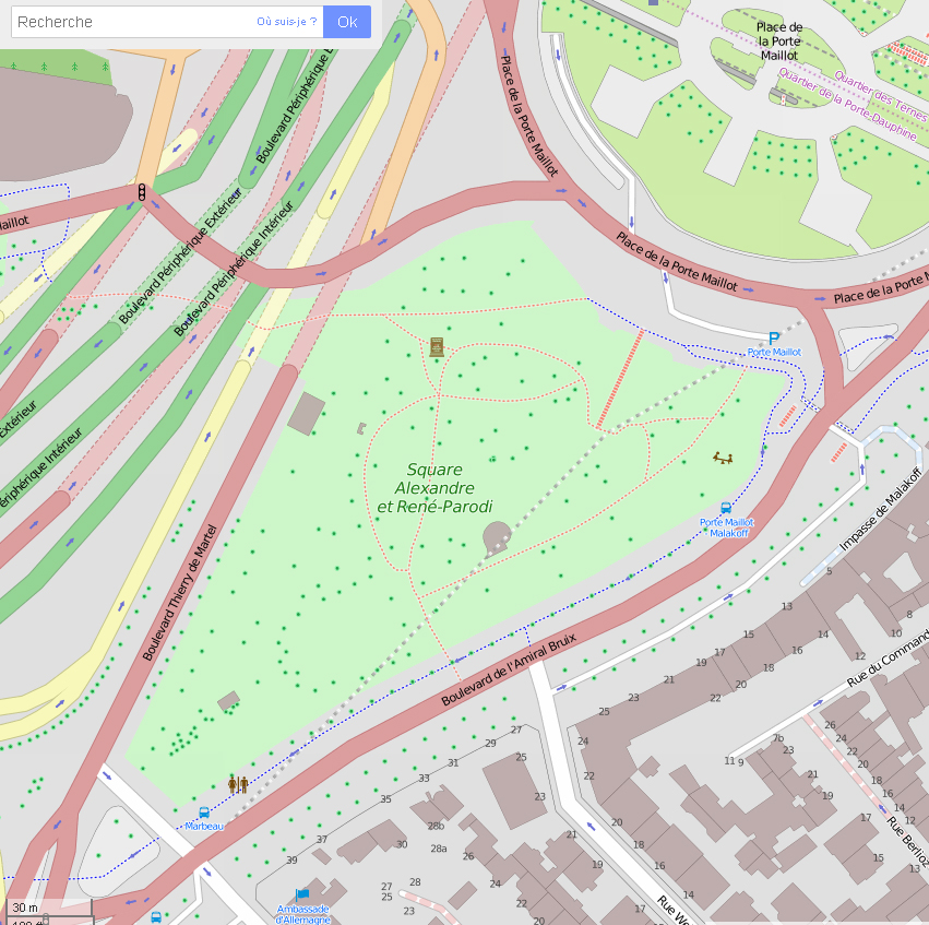 plan OpenStreetMap du square Parodi Paris 16è près de la porte Maillot